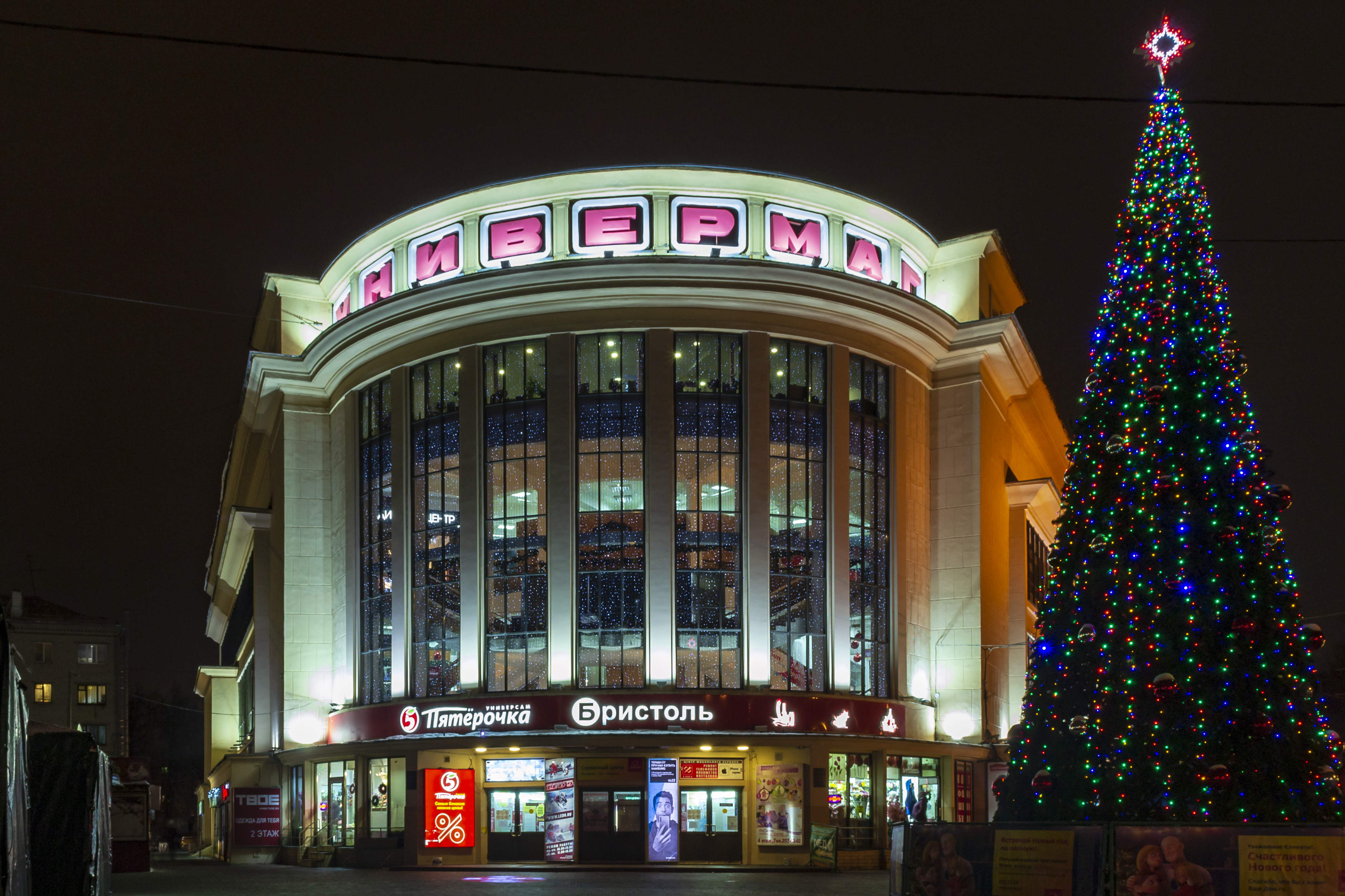 Автозаводский универмаг ночью с подсветкой